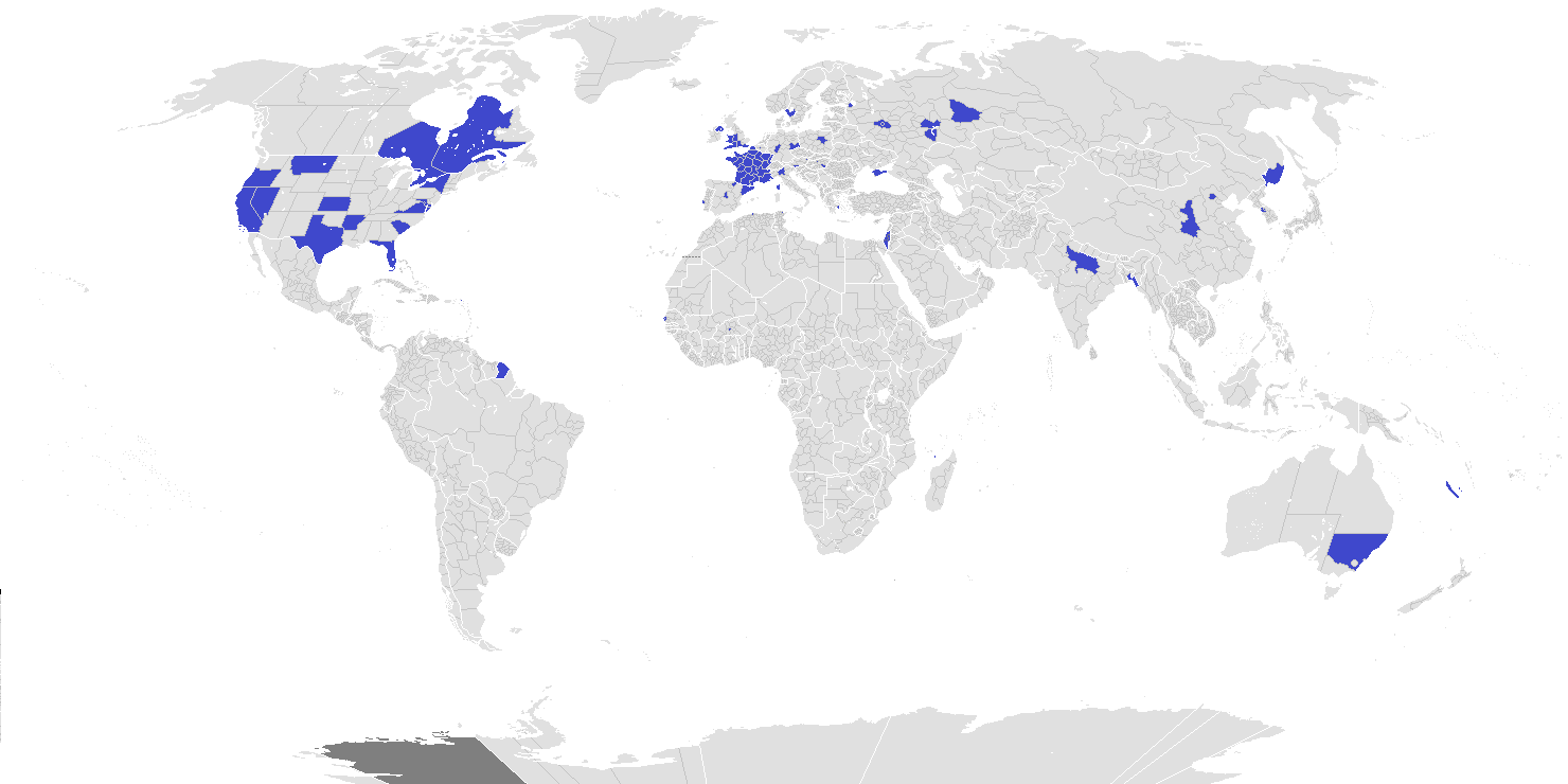 Cette carte montre les territoires régionaux visités au moins une fois par les journalistes de l'émission Quotidien de Yann Barthès, au cours de la saison 2 (2017-2018).